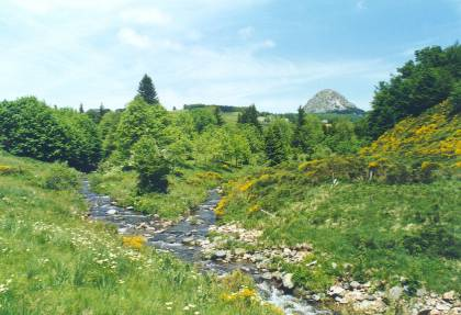 Confluent de la Loire et de l'Aigue Nègre au pied du mont Gerbier de Jonc (France/Ardèche).